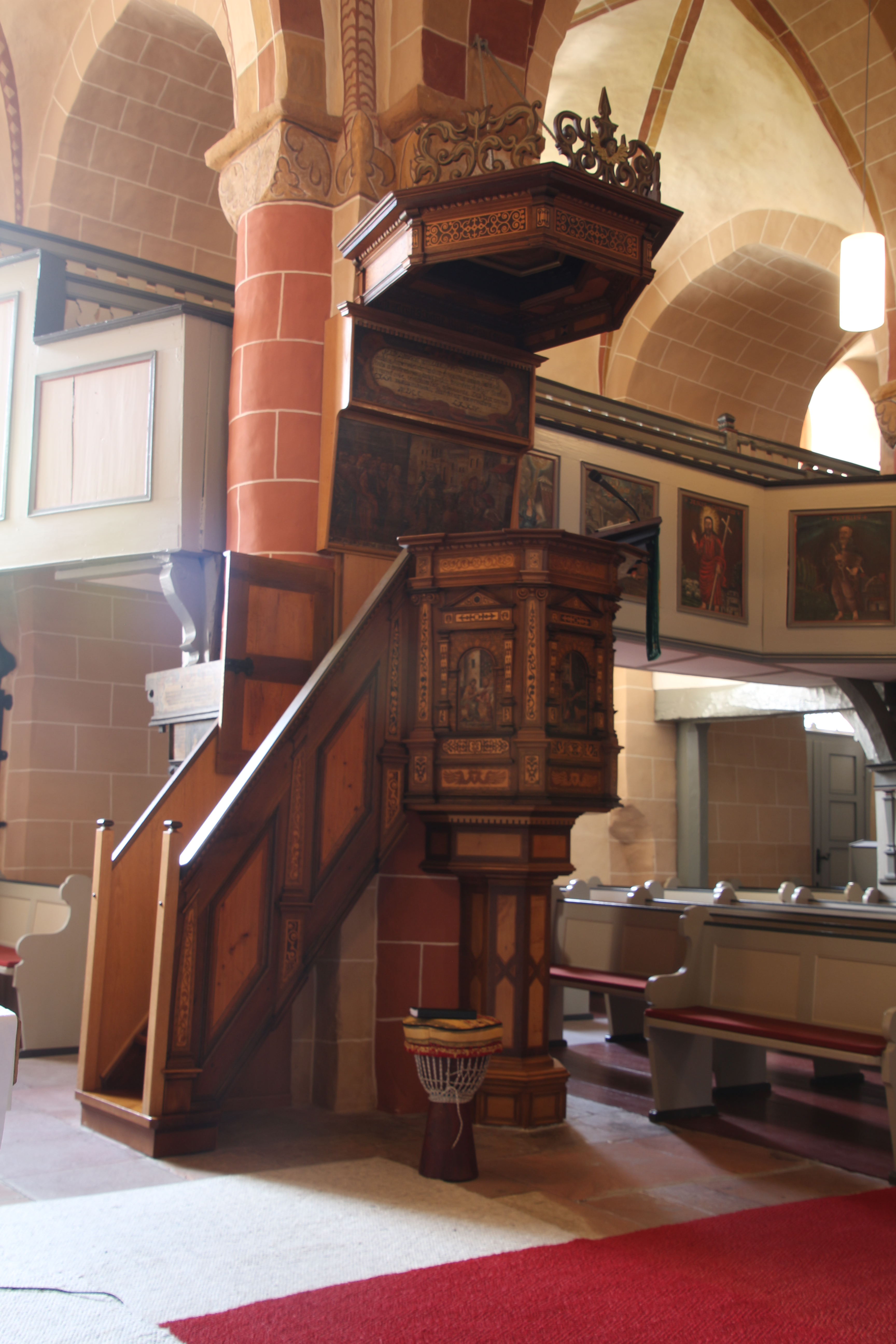 Evangelische Kirche Breidenbach, Landkreis Marburg-Biedenkopf, Hessen